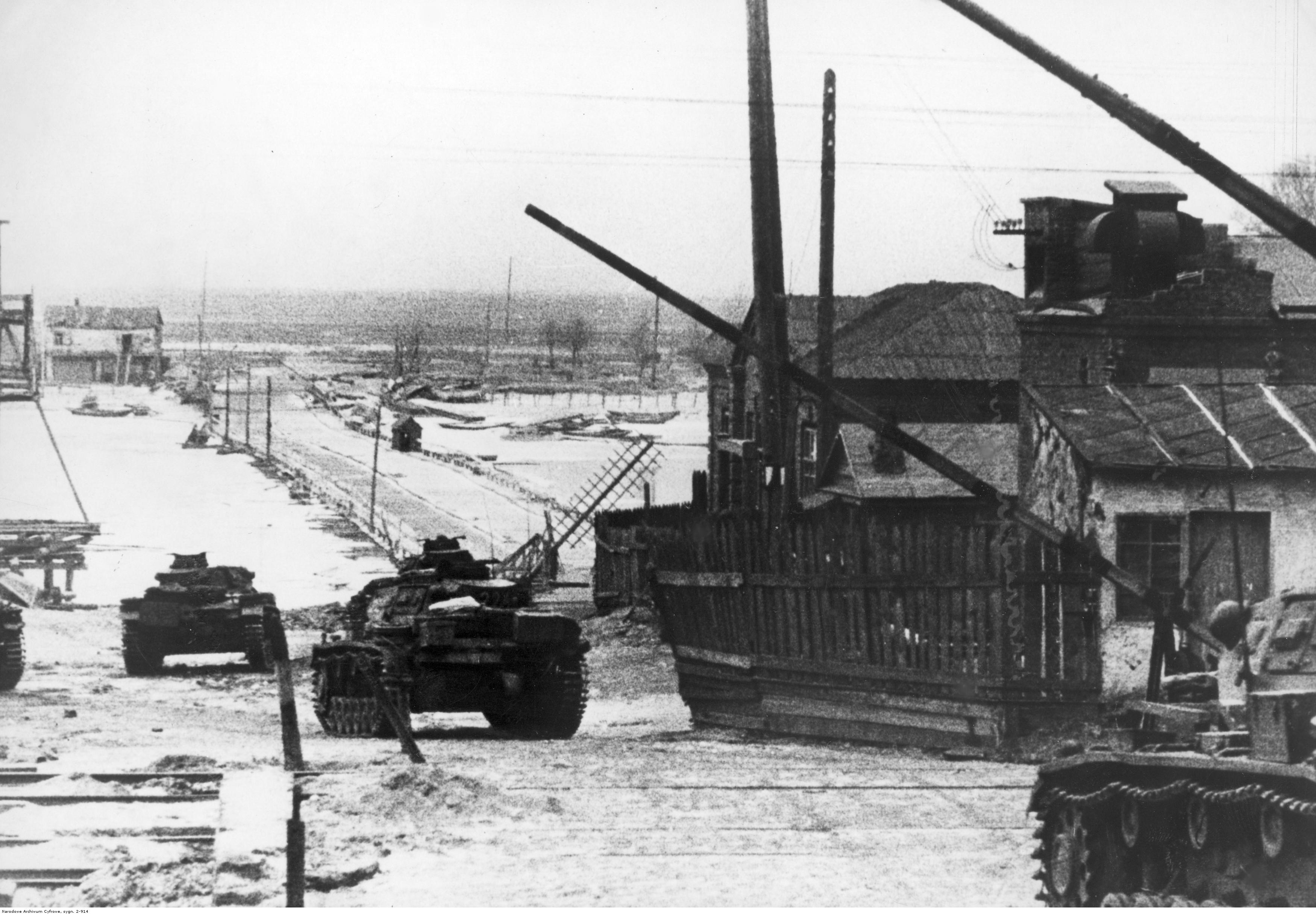 Wkroczenie wojsk niemieckich do Rostowa. Kolumna czołgów PzKpfw III przejeżdża przez przejazd kolejowy.